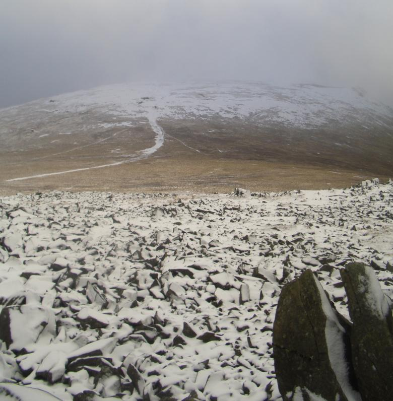 Foel Grach from Carnedd Gwenllian